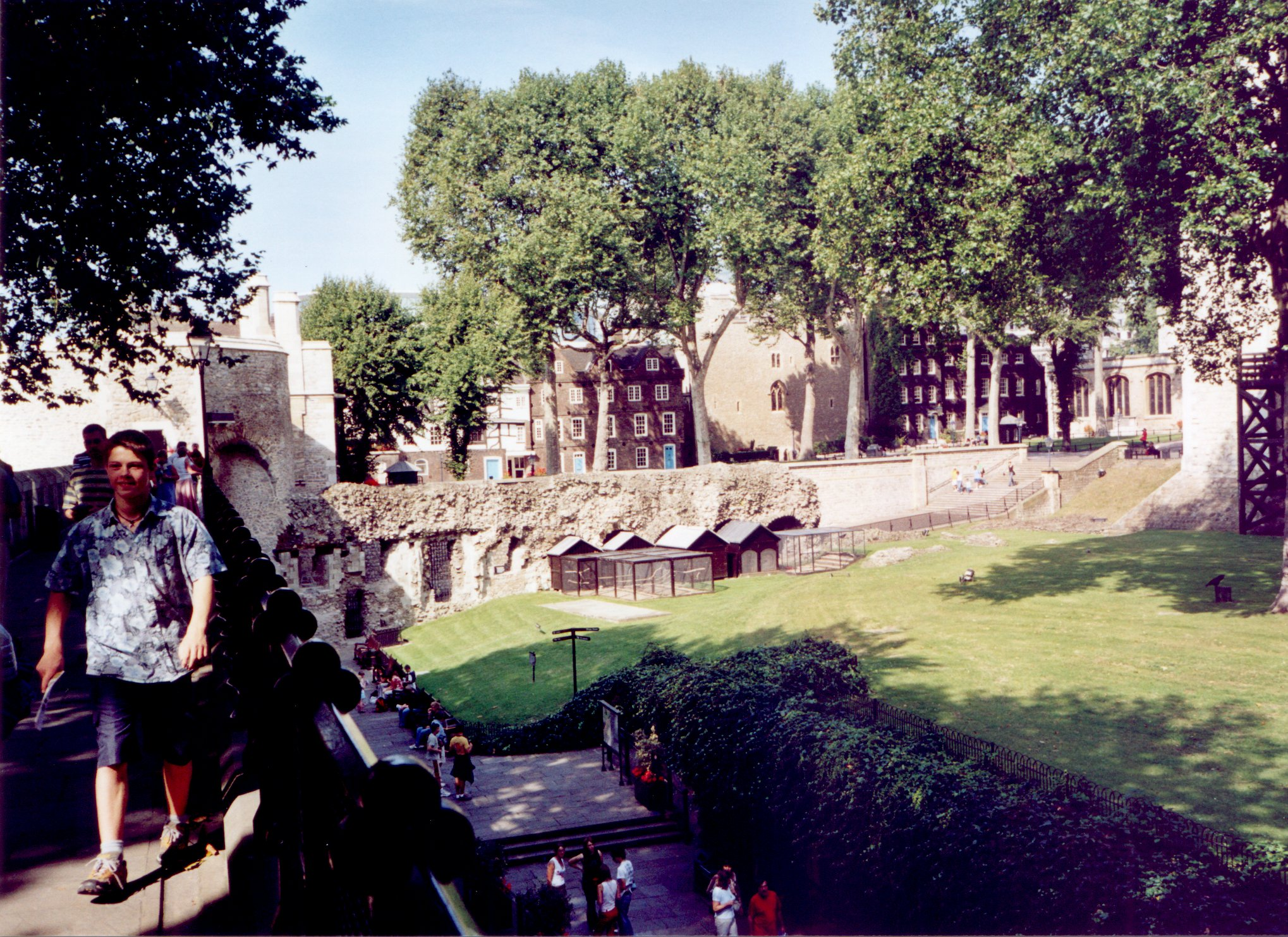 Innenhof des Tower von London von der Mauer, dem Wall Walk aus. Im Hintergrund sind der Tower Green und die Scaffold Site. In der Mitte sind die Raben, von denen laut einer Legende seit Karl II. ständig eine Population im Tower gehalten wird.